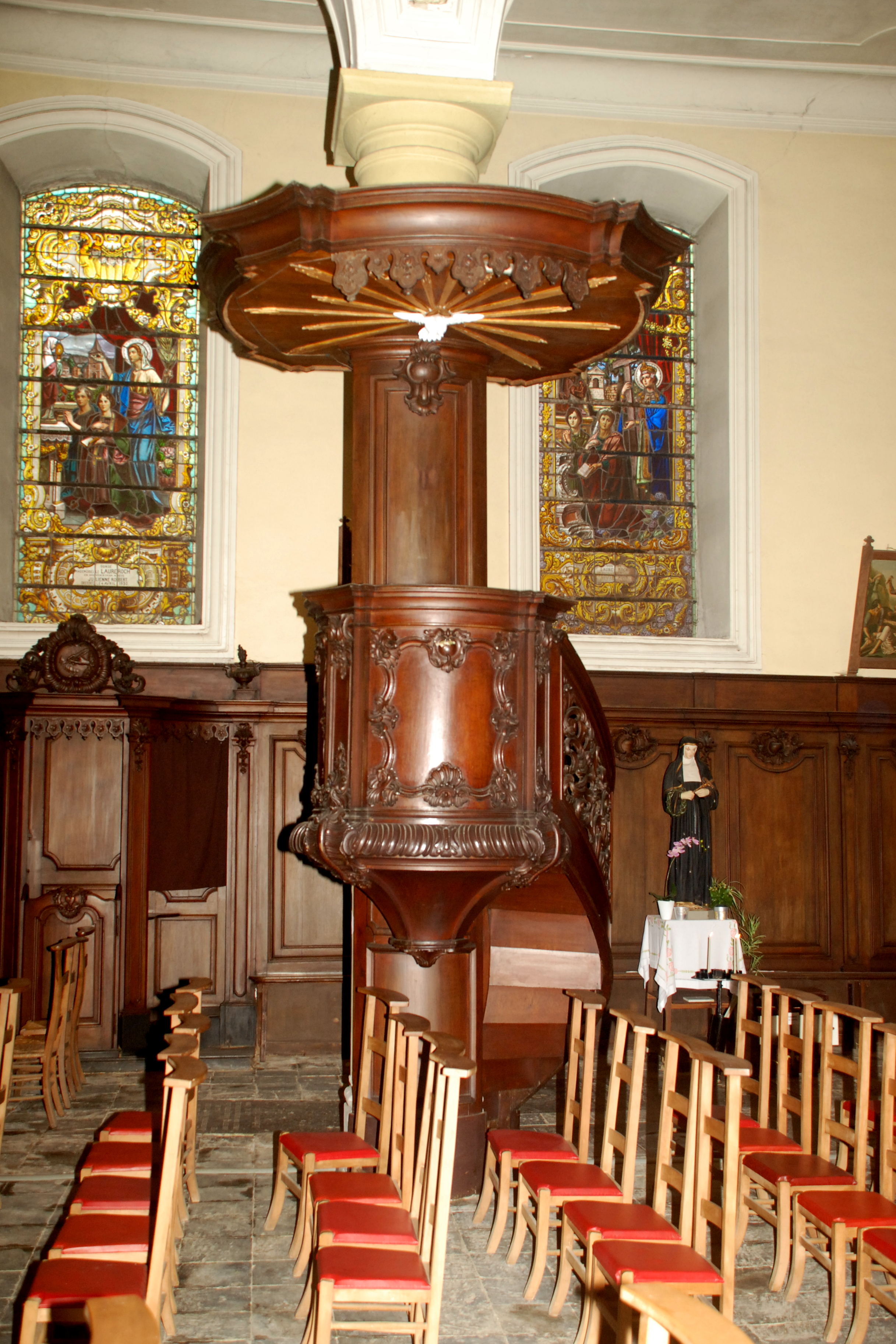 Belgique - Brabant wallon - Église Saint-Martin de Ways